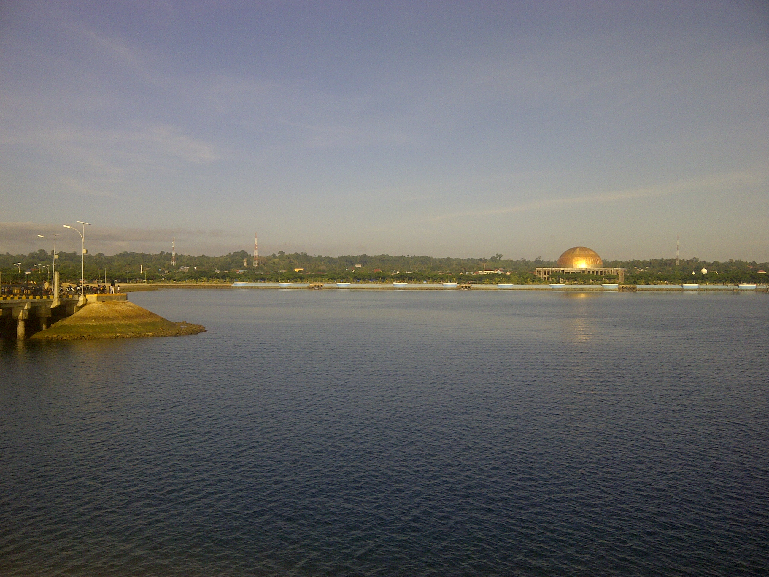 Le front de mer de Raha, Sulawesi du Sud-Est, Indonésie